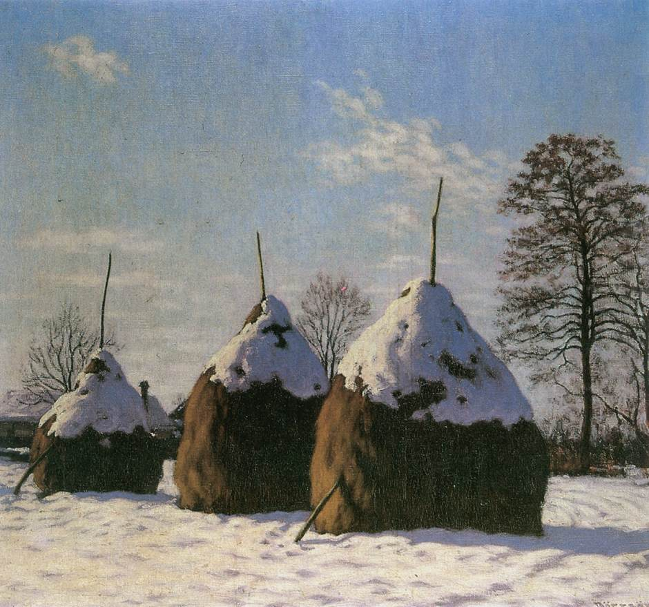 Börtsök Samu: Szénaboglyák (1910)